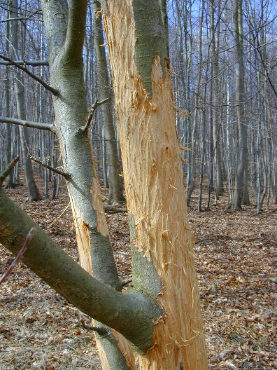 willow, debarked by red deer / Schälschaden an Weide durch Rotwild